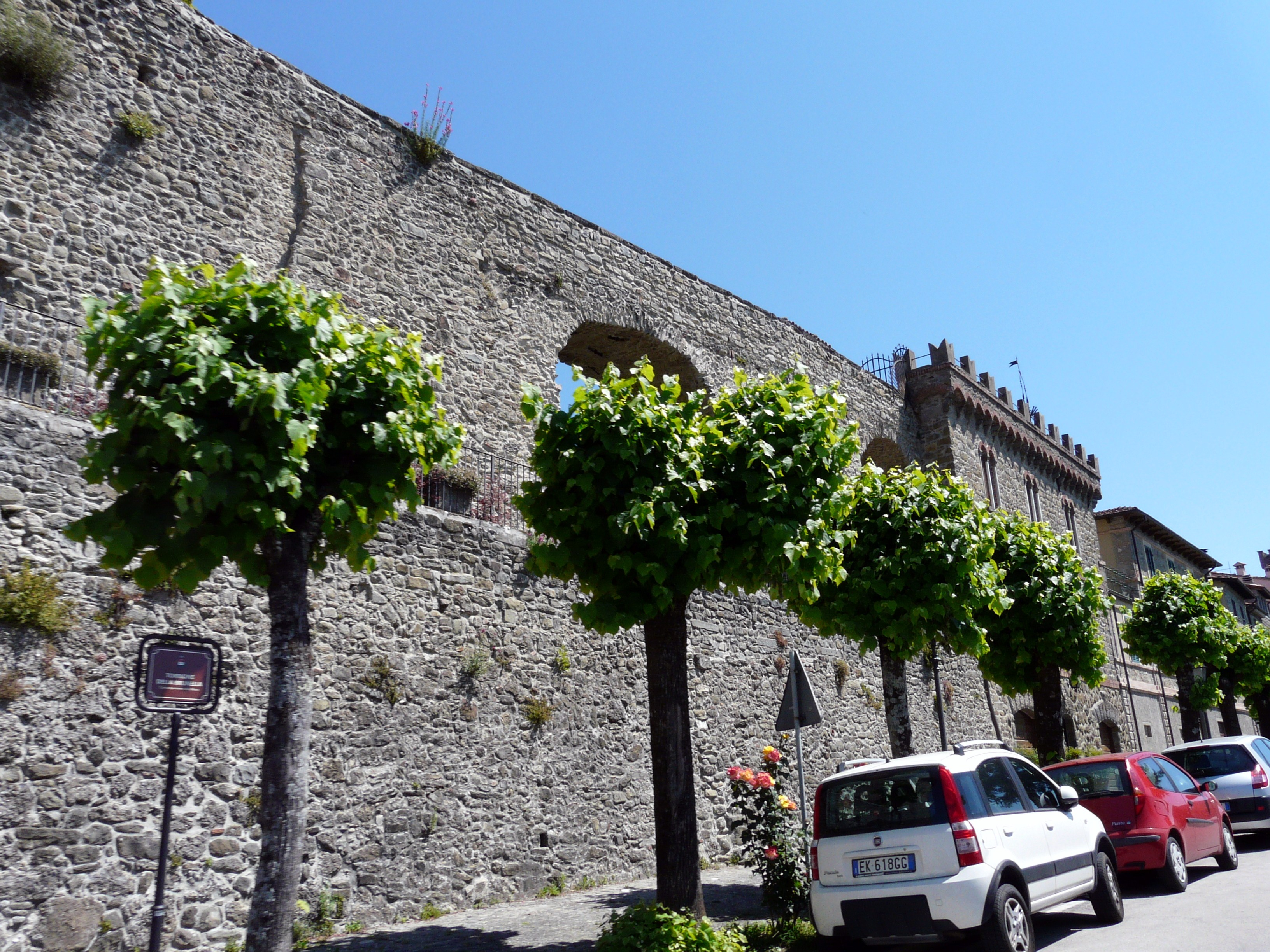 Mura, torri e porte di Castiglione di Garfagnana, Toscana, Italia